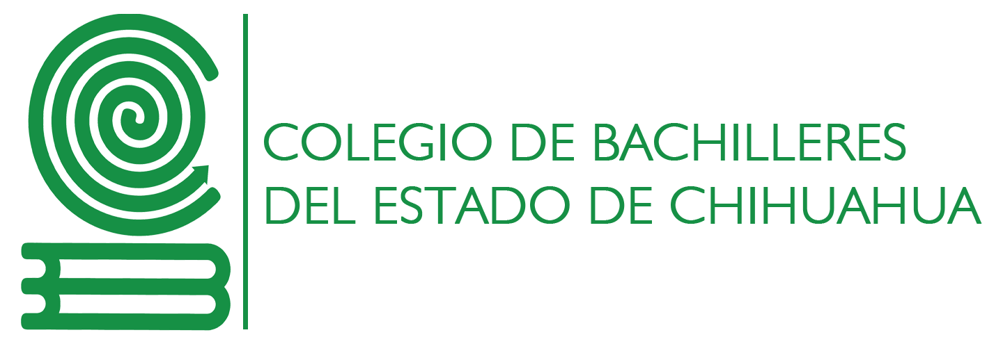 Logotipo del Colegio de Bachilleres del Estado de Chihuahua